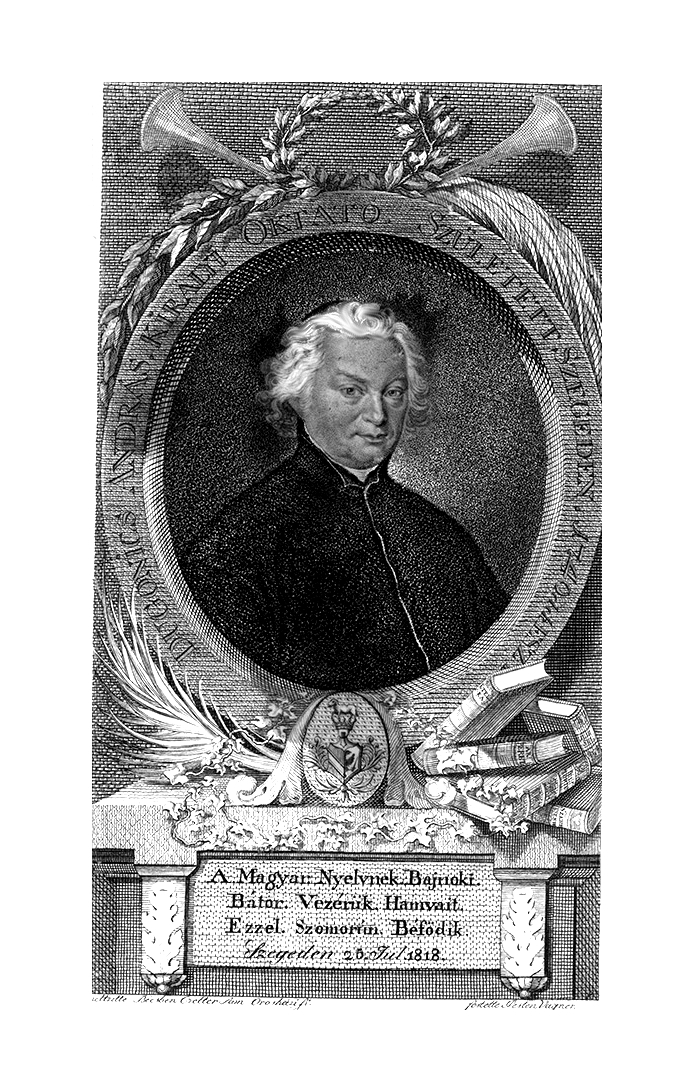 Dugonics András (Szeged, 1740. október 17. – Szeged, 1818. július 25.) piarista szerzetes, író, egyetemi tanár.